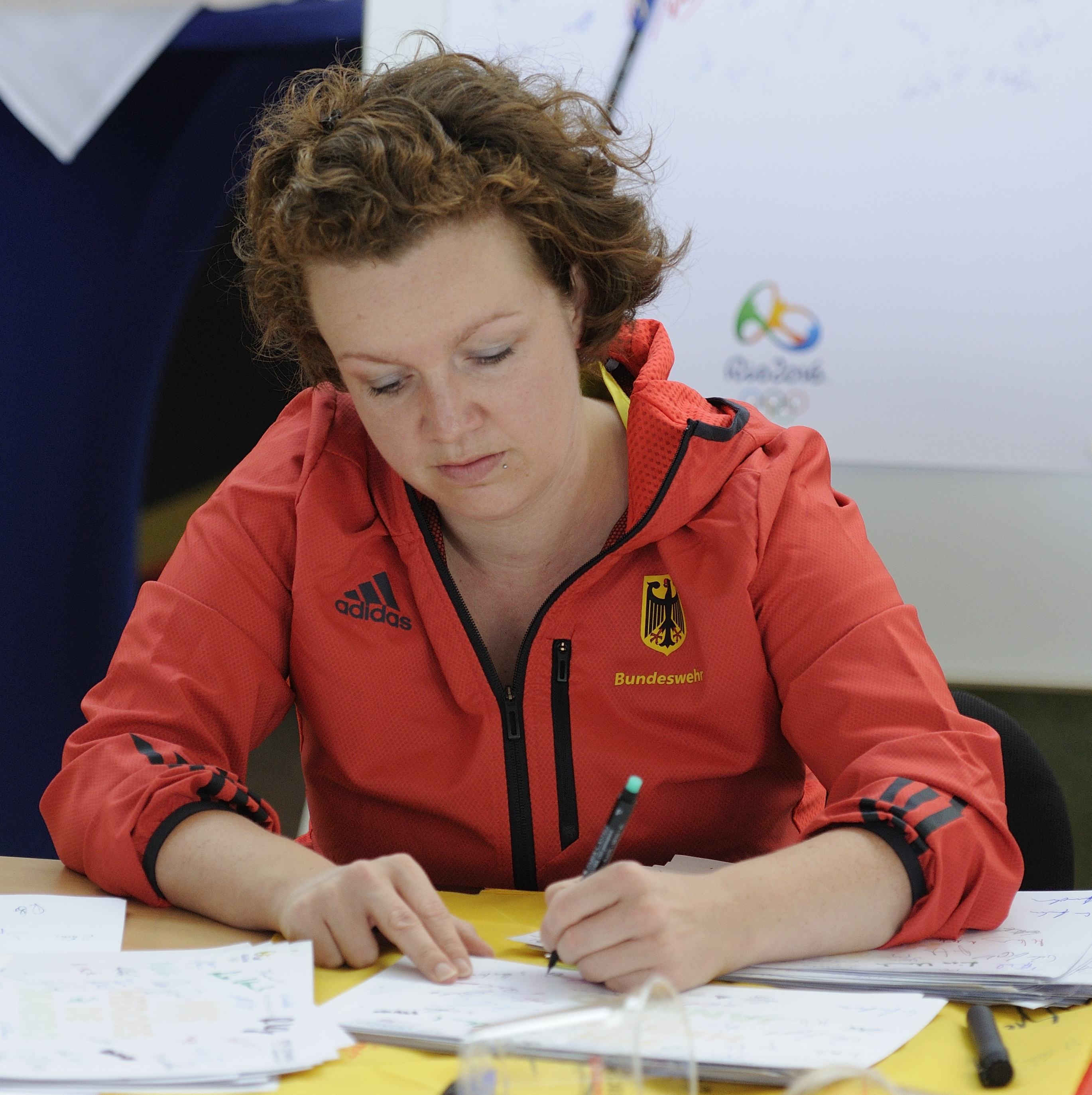 Bild aufgenommen in Hannover während der Einkleidung der deutschen Olympiamannschaft 2016. Eva Rösken.